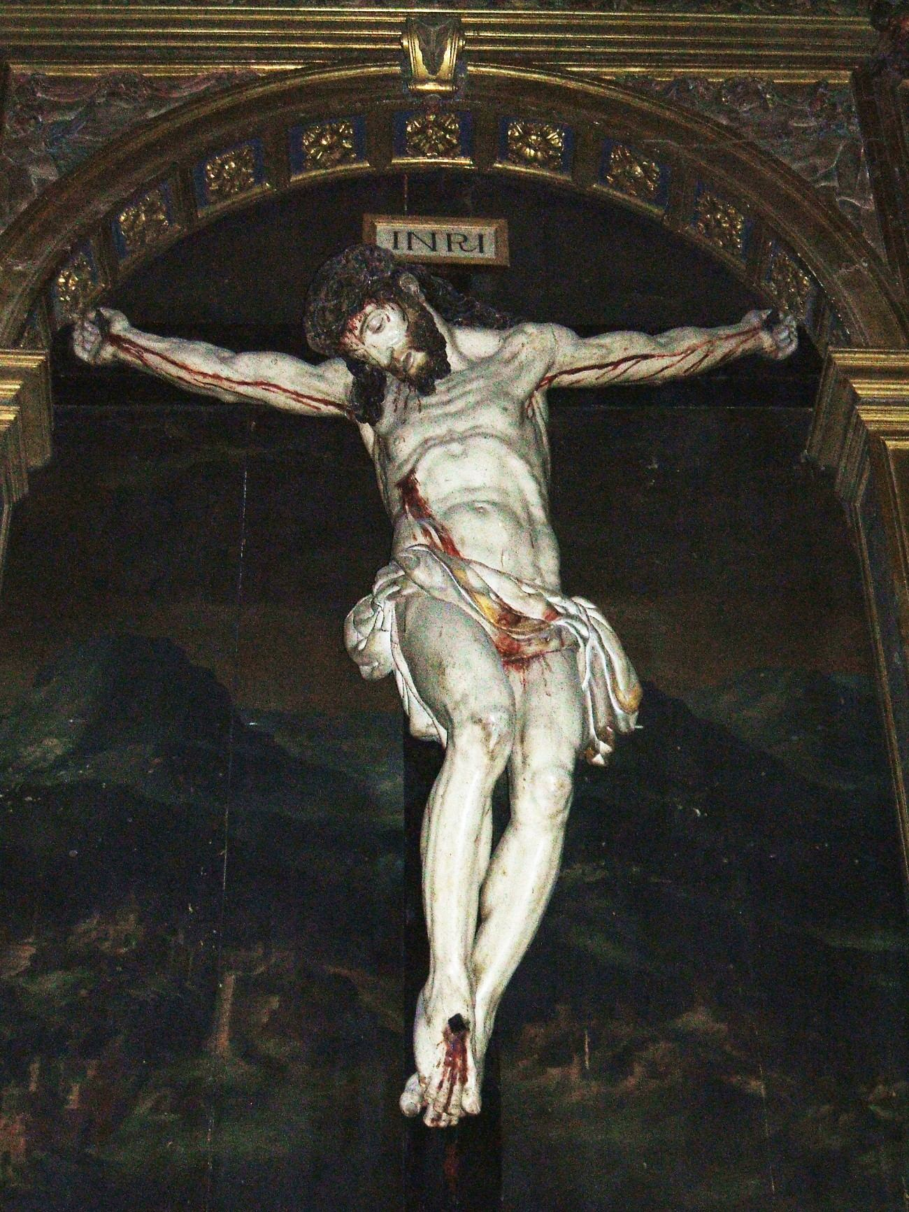 Crucificado, de Esteban Jordán (siglo XVI), en la Basílica Menor y Santuario Nacional de la Gran Promesa, Valladolid, España/Spain